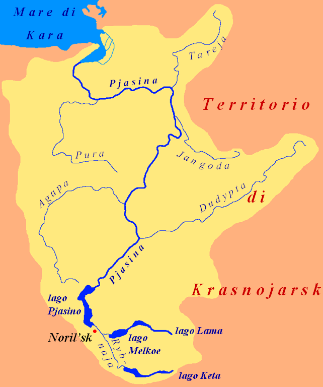 Bacino della Pjasina